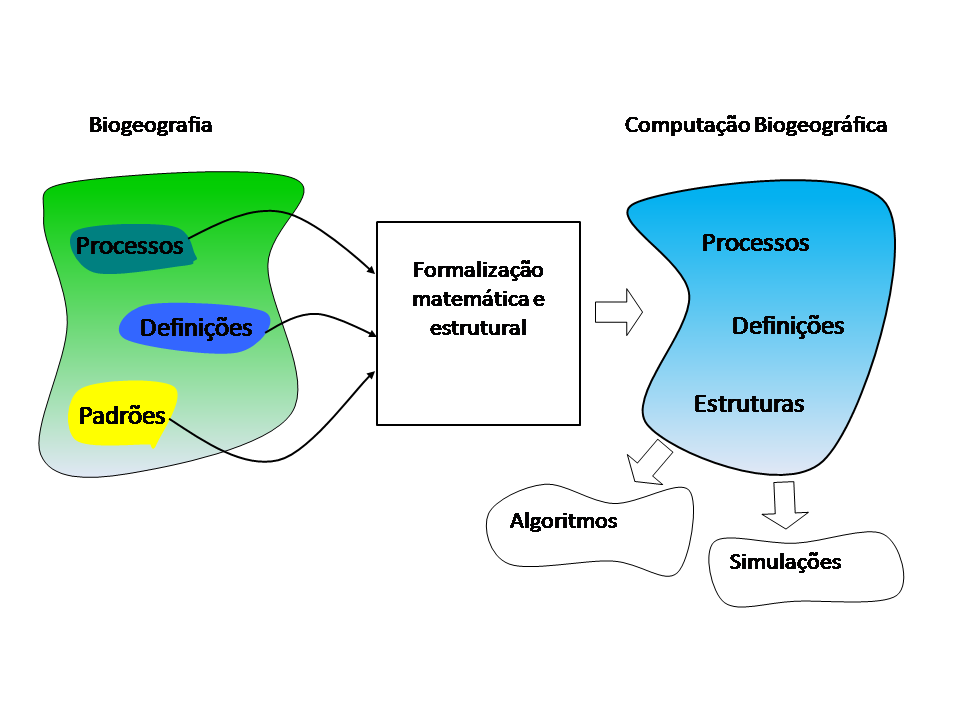 Computação Biogeográfica Framework